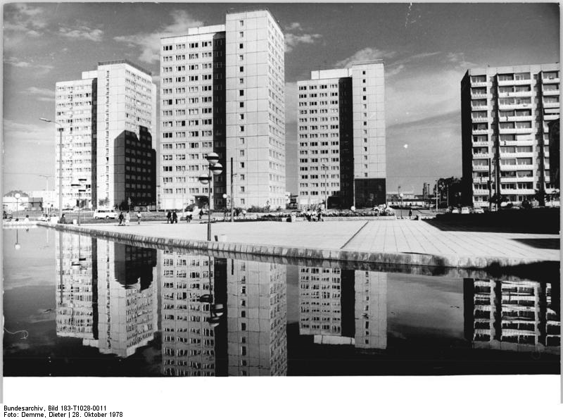 ADN-ZB / Demme / 28.10.78 / Erfurt: Schöne DDR. Ein schönes Beispiel sozialistischer Architektur und Umweltgestaltung bieten diese Hochhäuser an der Straße der Völkerfreundschaft im Erfurter Neubauviertel Rieth. (siehe auch 12 N) Information added by Wikimedia users.Das Hochhaus ist vom Plattenbau-Typ Punkthaus Wohnbaureihe Erfurt (WBR Erfurt). Entwickelt 1969 vom VE Wohnungsbaukombinat Erfurt, Entwurf: Gert Widder, Günther Hähndel, Käthe Schul, Lutz Braumbach. Hier: Das Bild wurde vom Becken der Wasserspiele aufgenommen, heute Vilniuser Straße (links) und Mainzer Straße (vor den Wohntürmen). Blick hinüber in die Kasseler Straße.